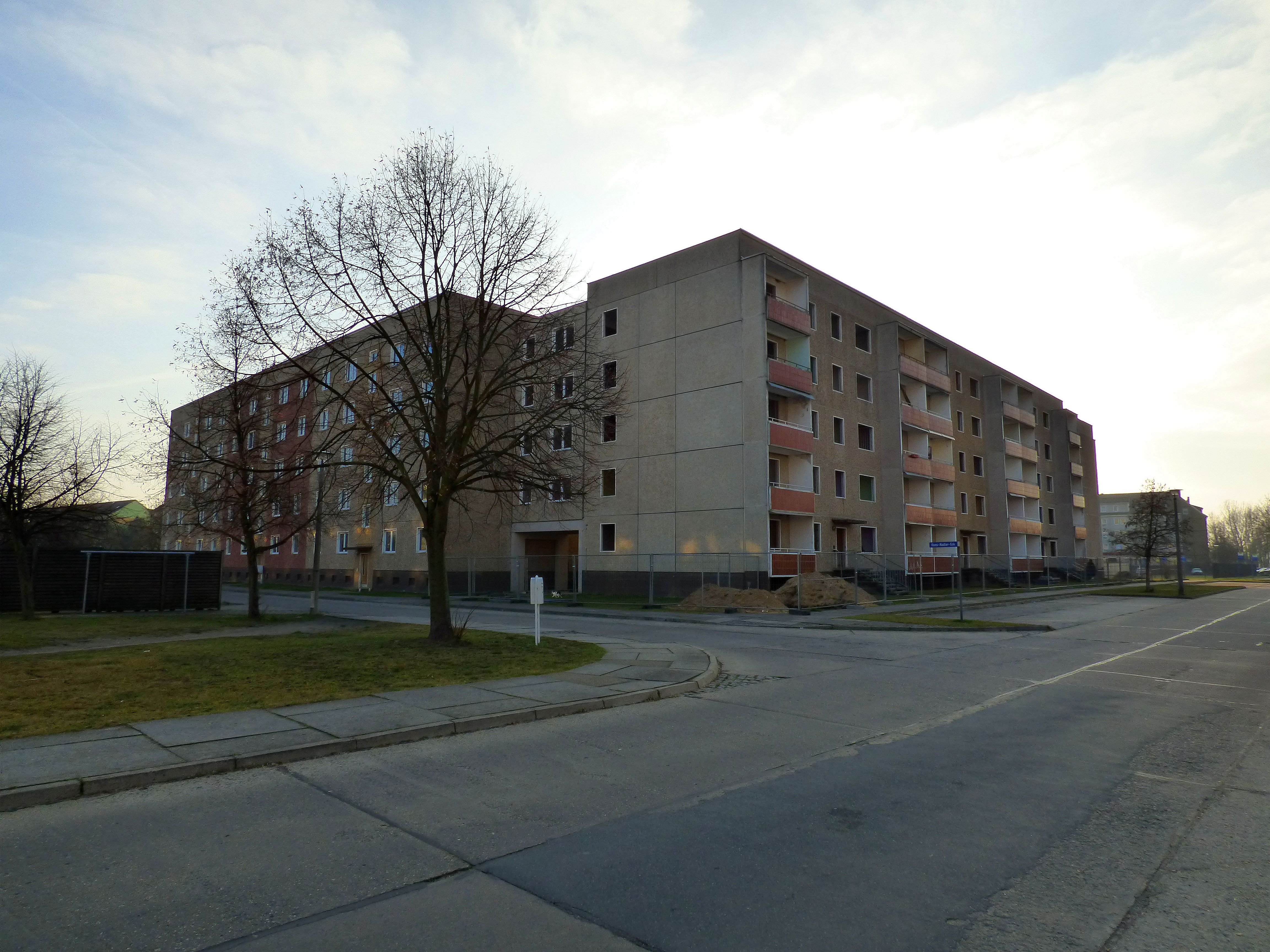 Hans-Nadler-Eck/ Vredener Straße in Elsterwerda